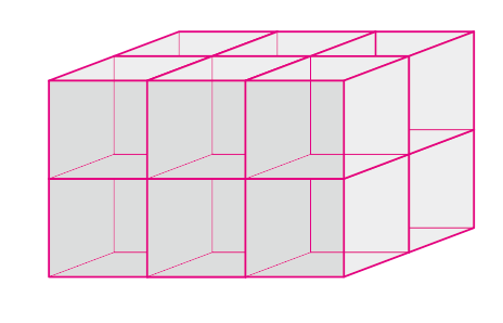 立方体空間充填